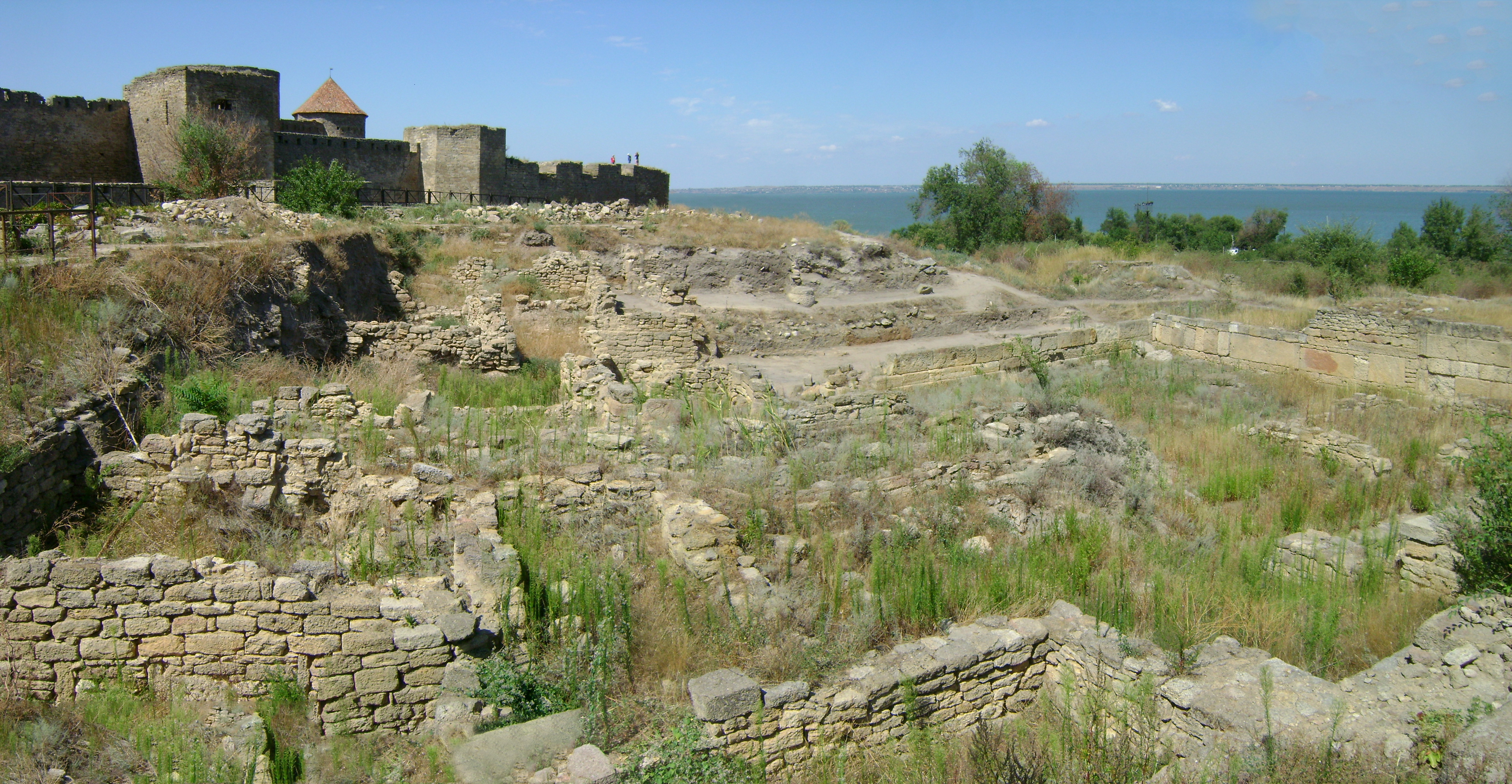 Городище «Тіра-Білгород», Білгород-Дністровський, територія фортеці і суміжна територія